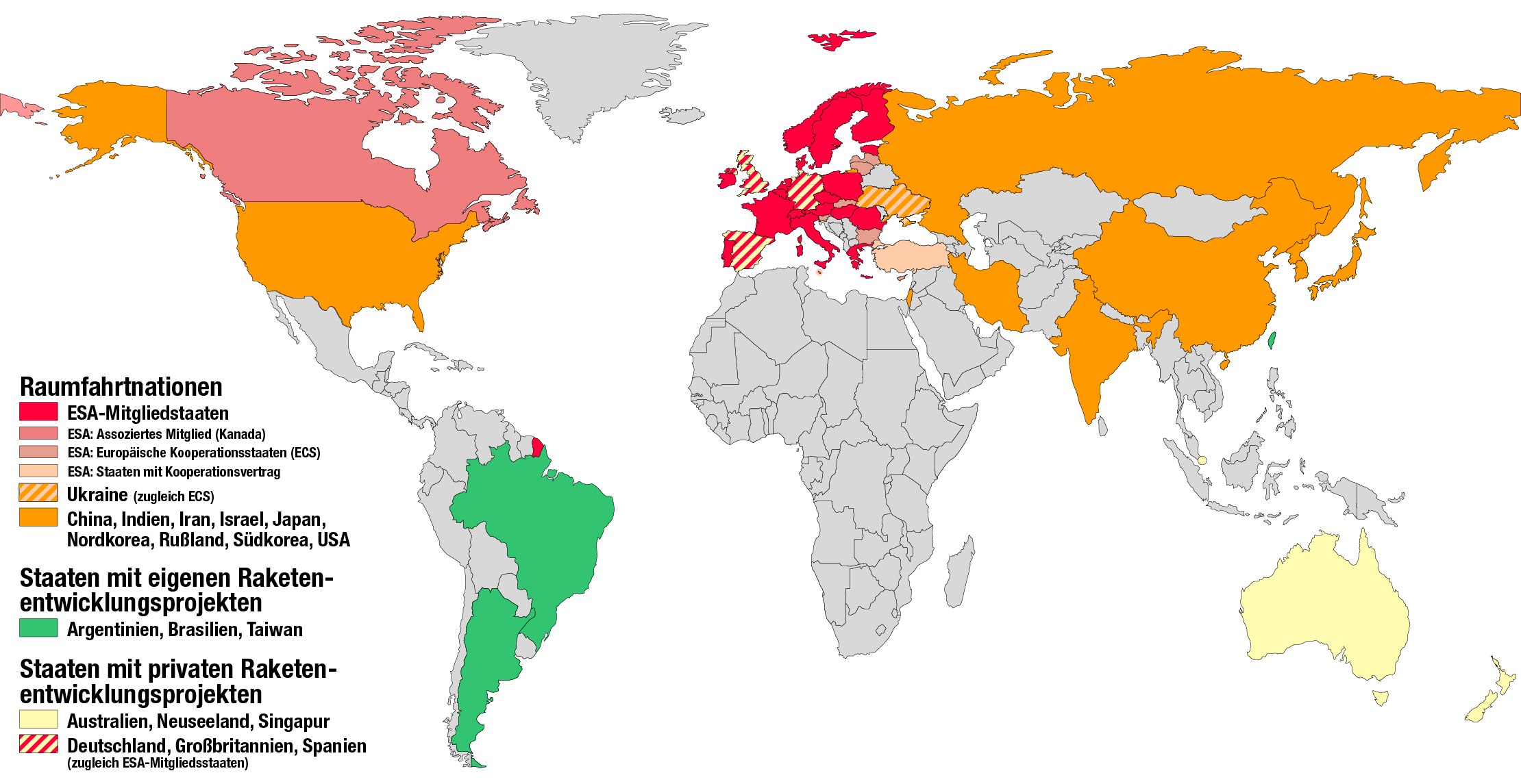 Karte der Raumfahrtnationen